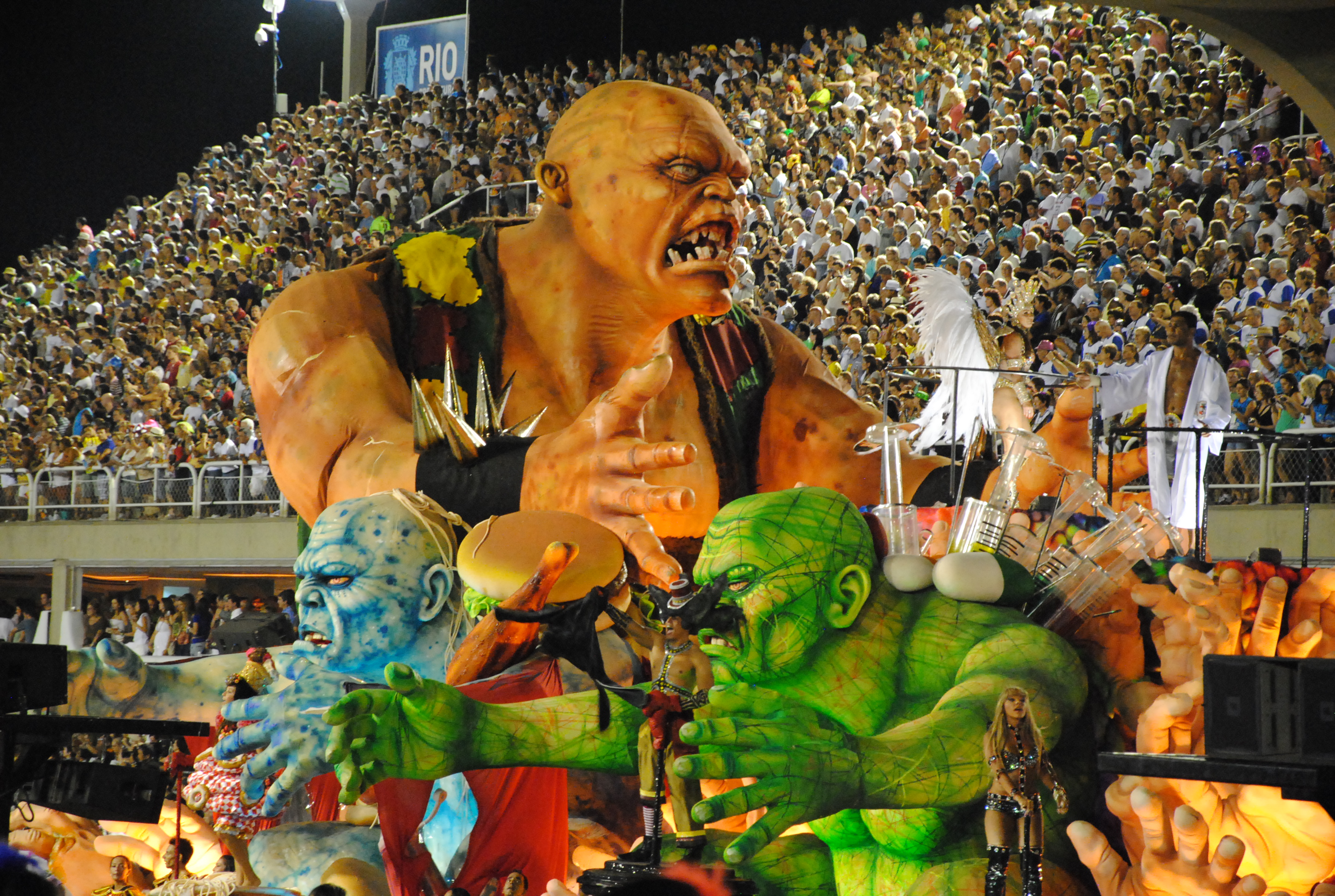 2012 Carnival parade in Rio de Janeiro - "Grande Rio" samba school.